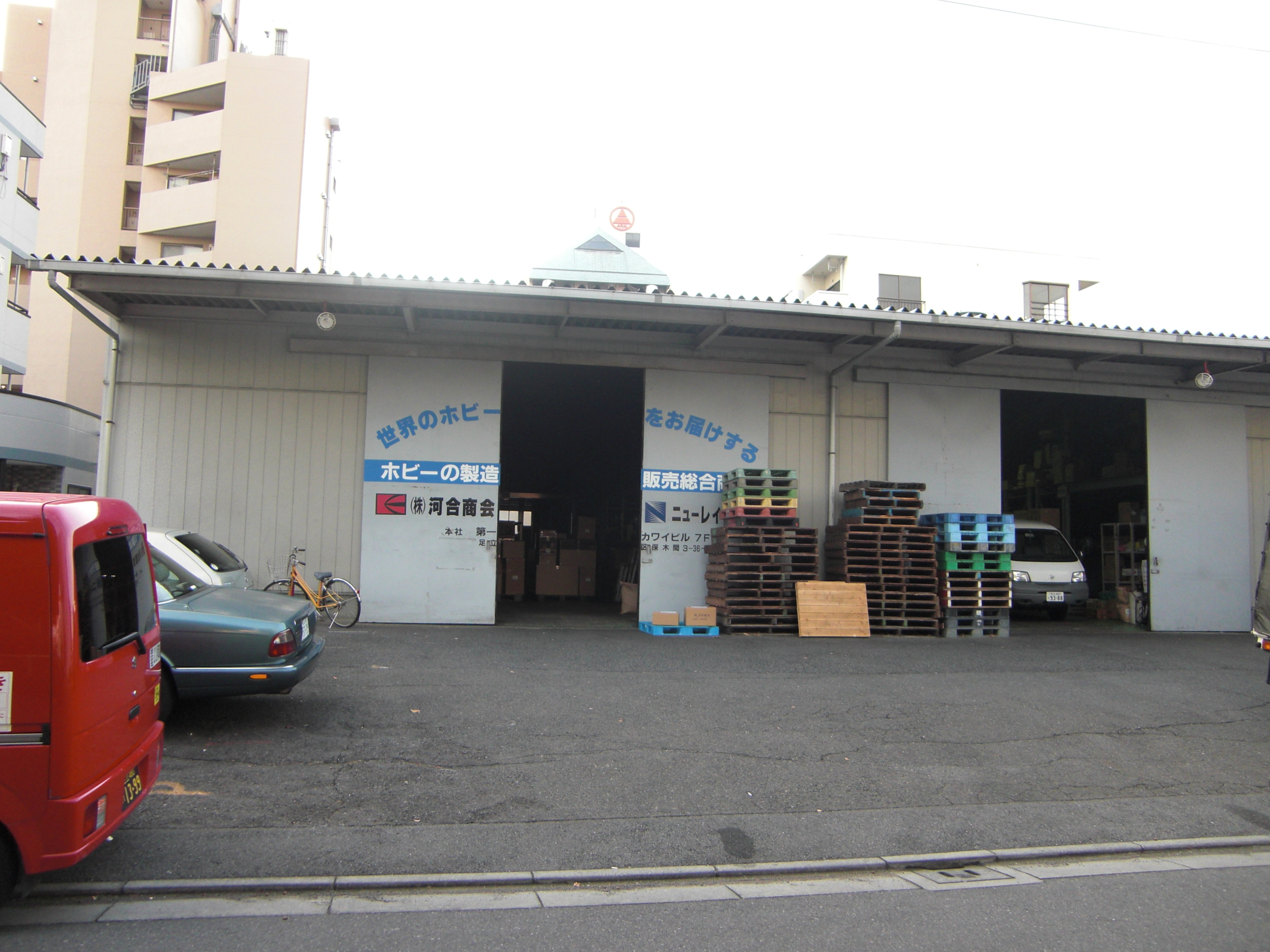 河合商会倉庫